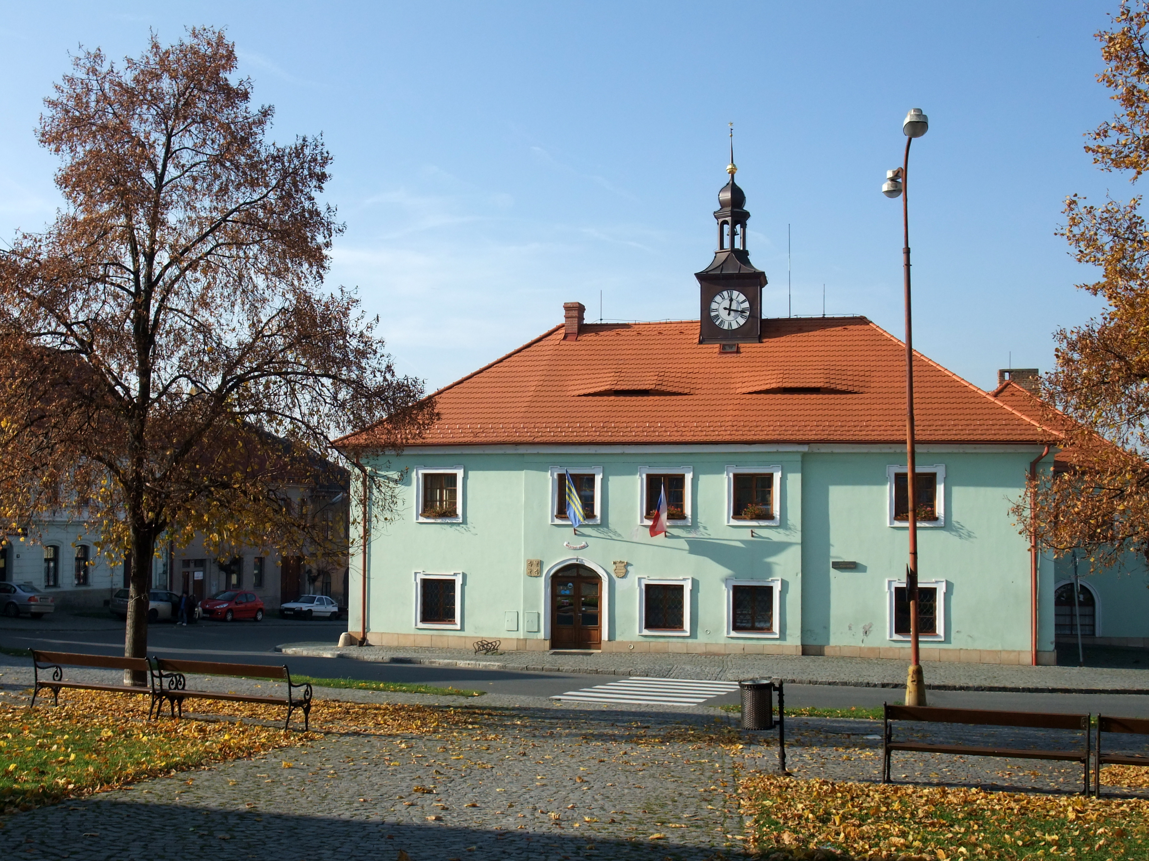 Radnice (Luže), nám. plk. Koukala 1, Luže